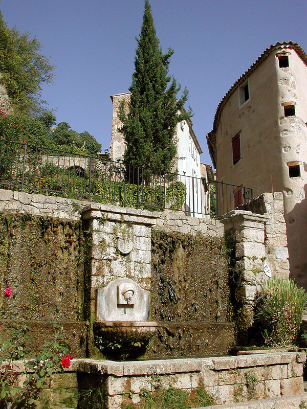 Fontaine du Real a Barjols 800 600.jpg